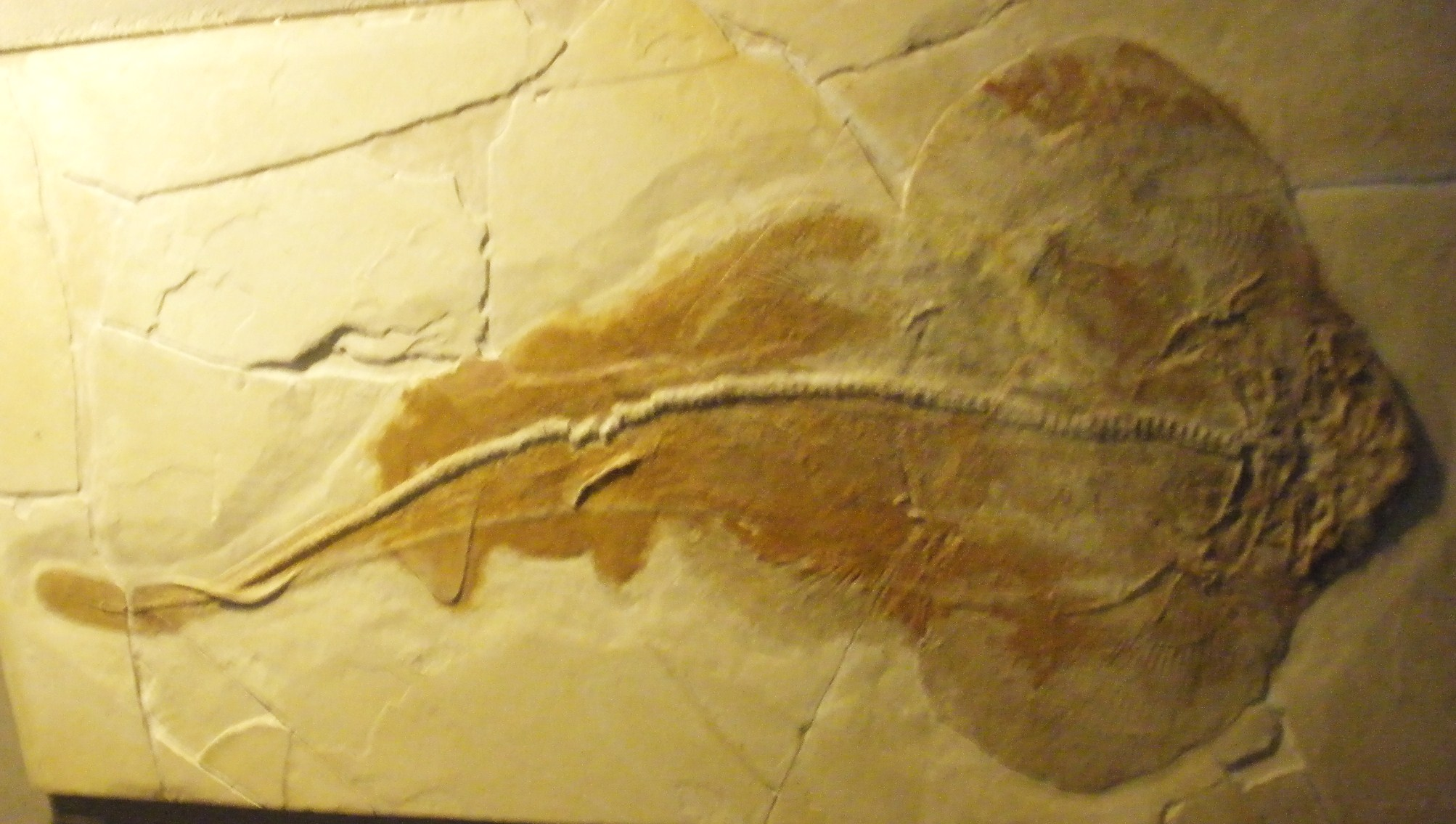 Fossil of Squatina minor, an extinct fish. Took the photo at Senckenberg Museum of Frankfurt